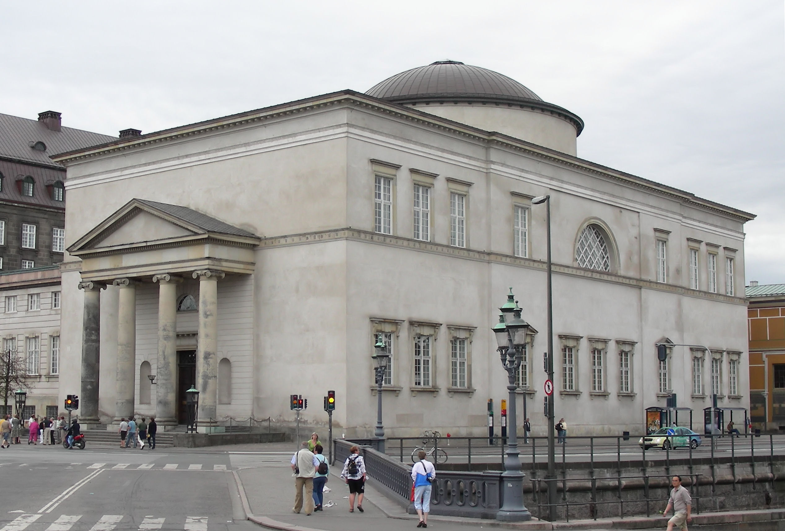 Christiansborg Slotskirke, Copenhagen, Denmark.